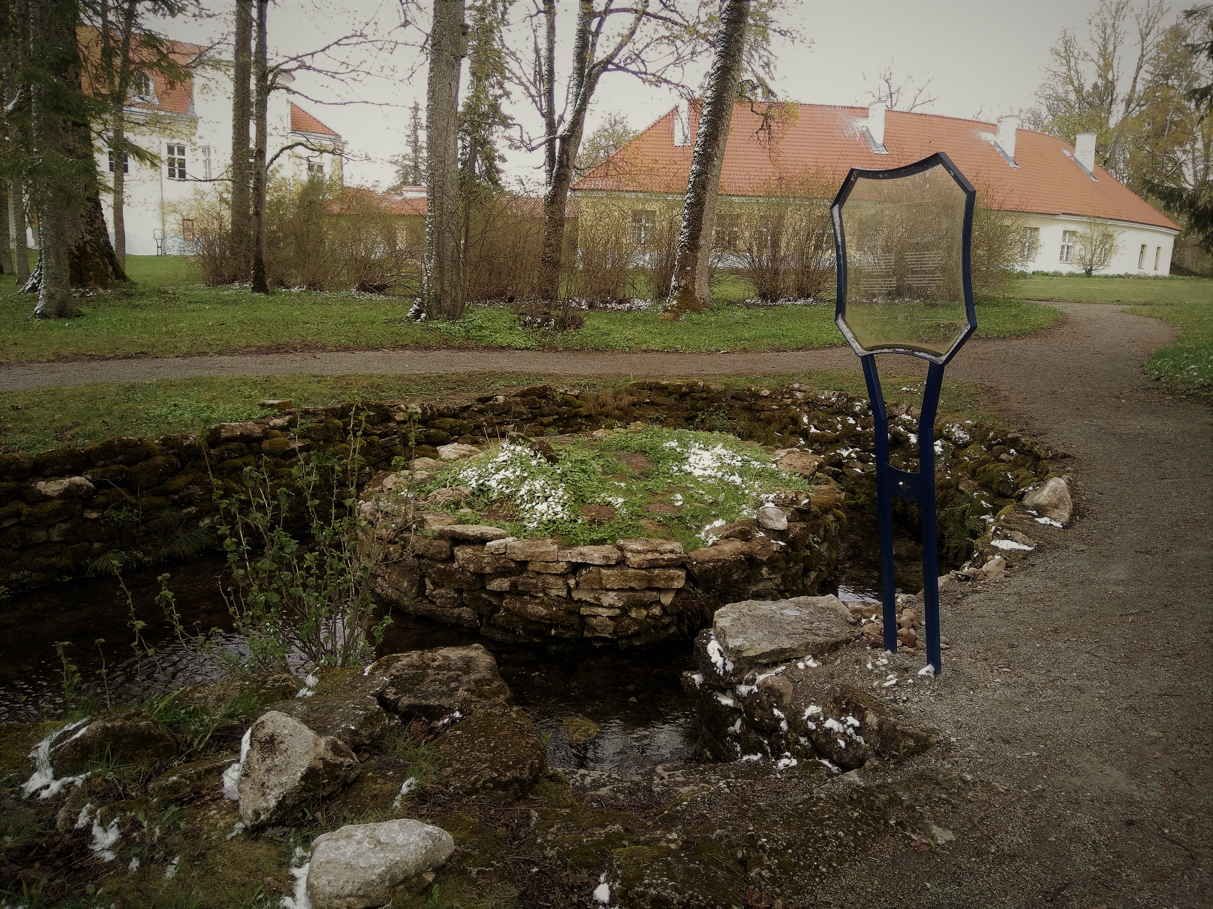 Vaade 2019 a. kevadel mõisast lõuna pool olevale Kiltsi allikale üle oja edelasuunast. Allikas on korda tehtud ja kaunilt kujundatud.